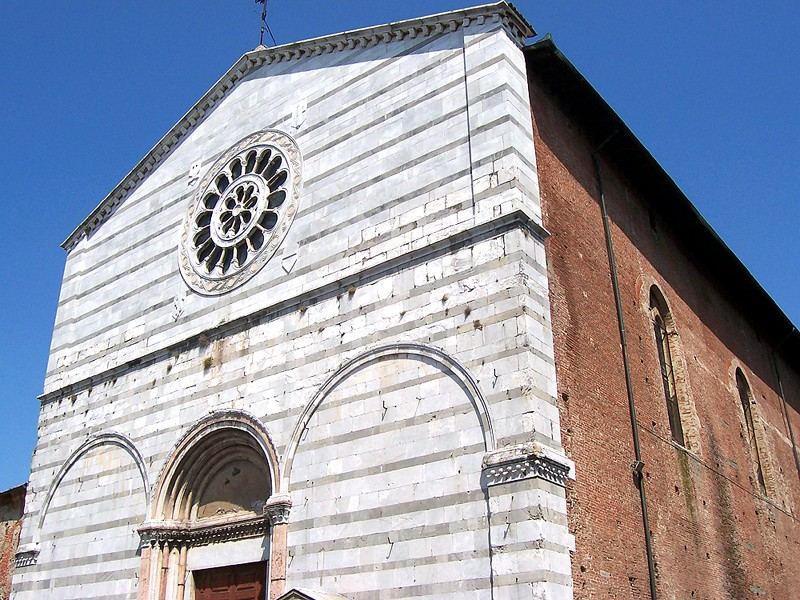 Lucca - Chiesa di S. Francesco